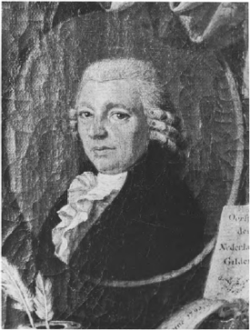 Willem Frans Gommar Verhoeven, mieux connu sous le nom Willem Verhoeven, né à Lierre, le 22 juin 1738 et mort à Malines, le 16 mai 1809, est un dramaturge et historien flamand, écrivant en langue néerlandaise.